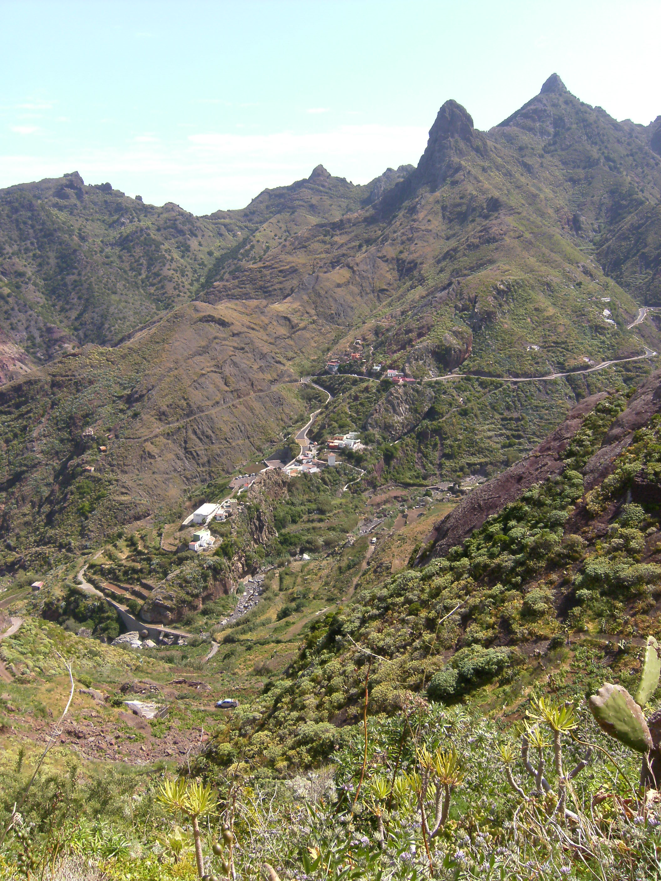 Vista del caserío de Afur, Anaga (Santa Cruz de Tenerife).